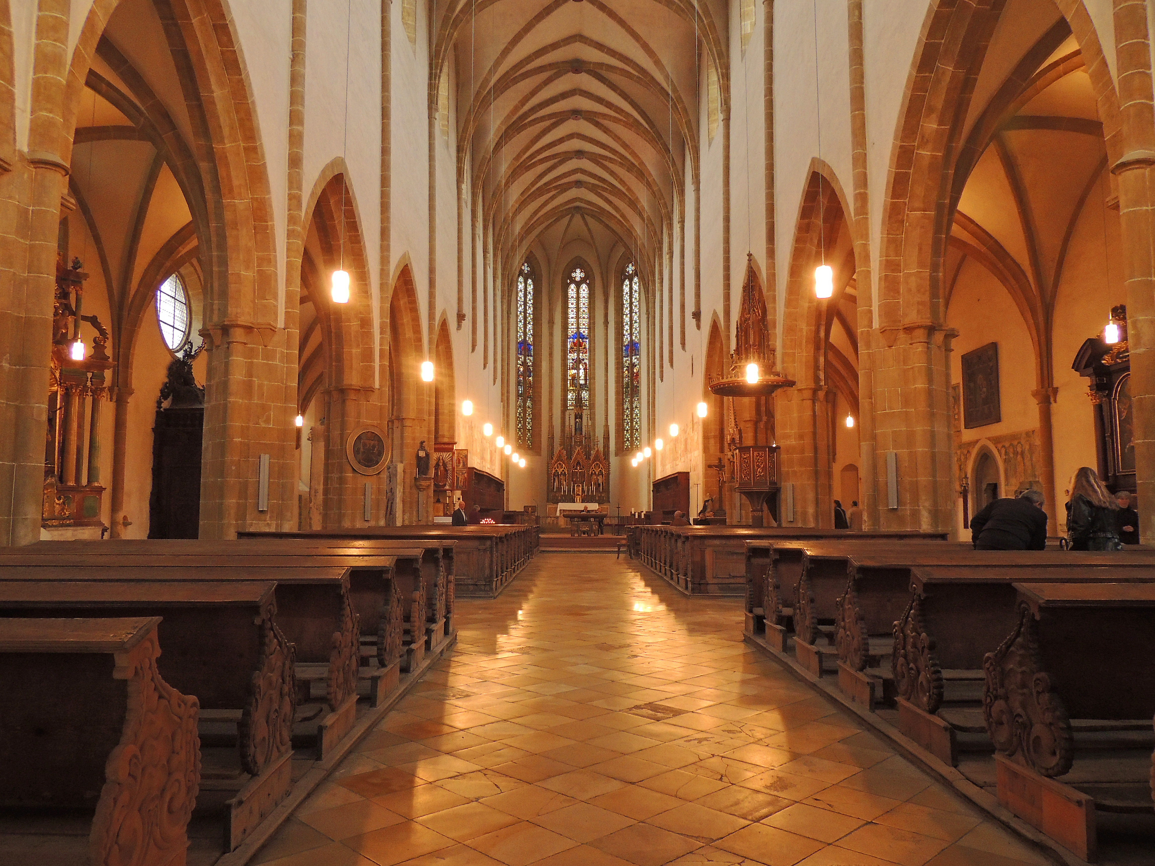 Die ehemalige Dominikanerkirche St. Blasius wurde von ca. 1246 bis 1384 erbaut. Sie ist die größte Kirche der Bettelorden in Süddeutschland.This is a photograph of an architectural monument.